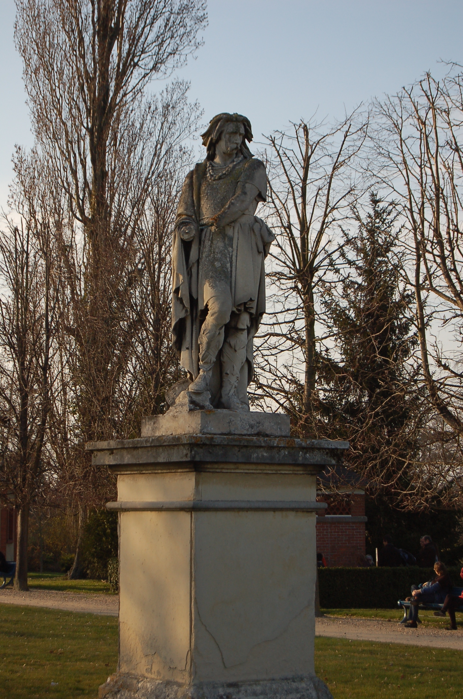 Statue de Vercingetorix par Aimé Millet dans la parc du château de Saint-Germain-en-Laye